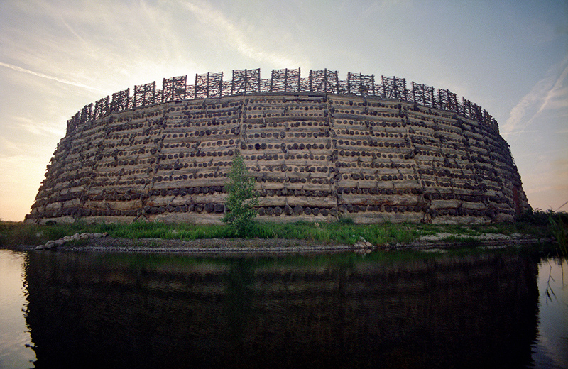 Slawenburg Raddusch